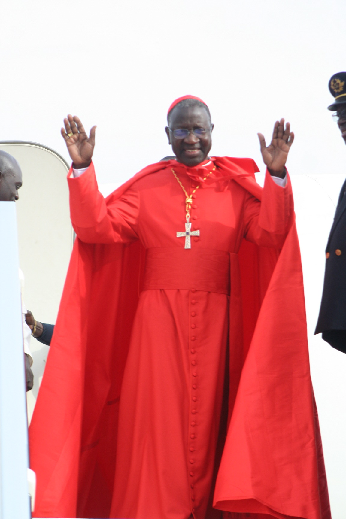 le Cardinal Théodore-Adrien Sarr, archevêque de Dakar